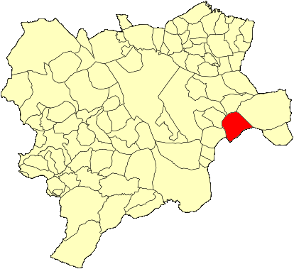 Mapa municipal de Montealegre del Castillo con el municipio de del Castillo Montealegre del Castillo resaltado en rojo.